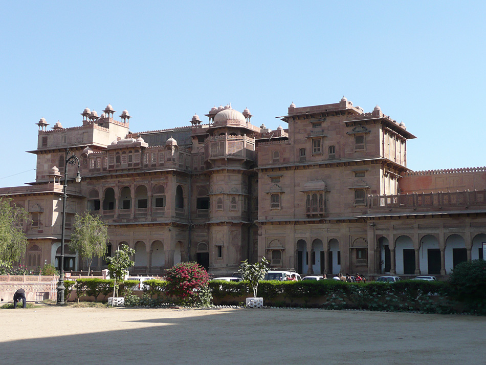 Junagarh-fort in Bikaner, Rajasthan, India